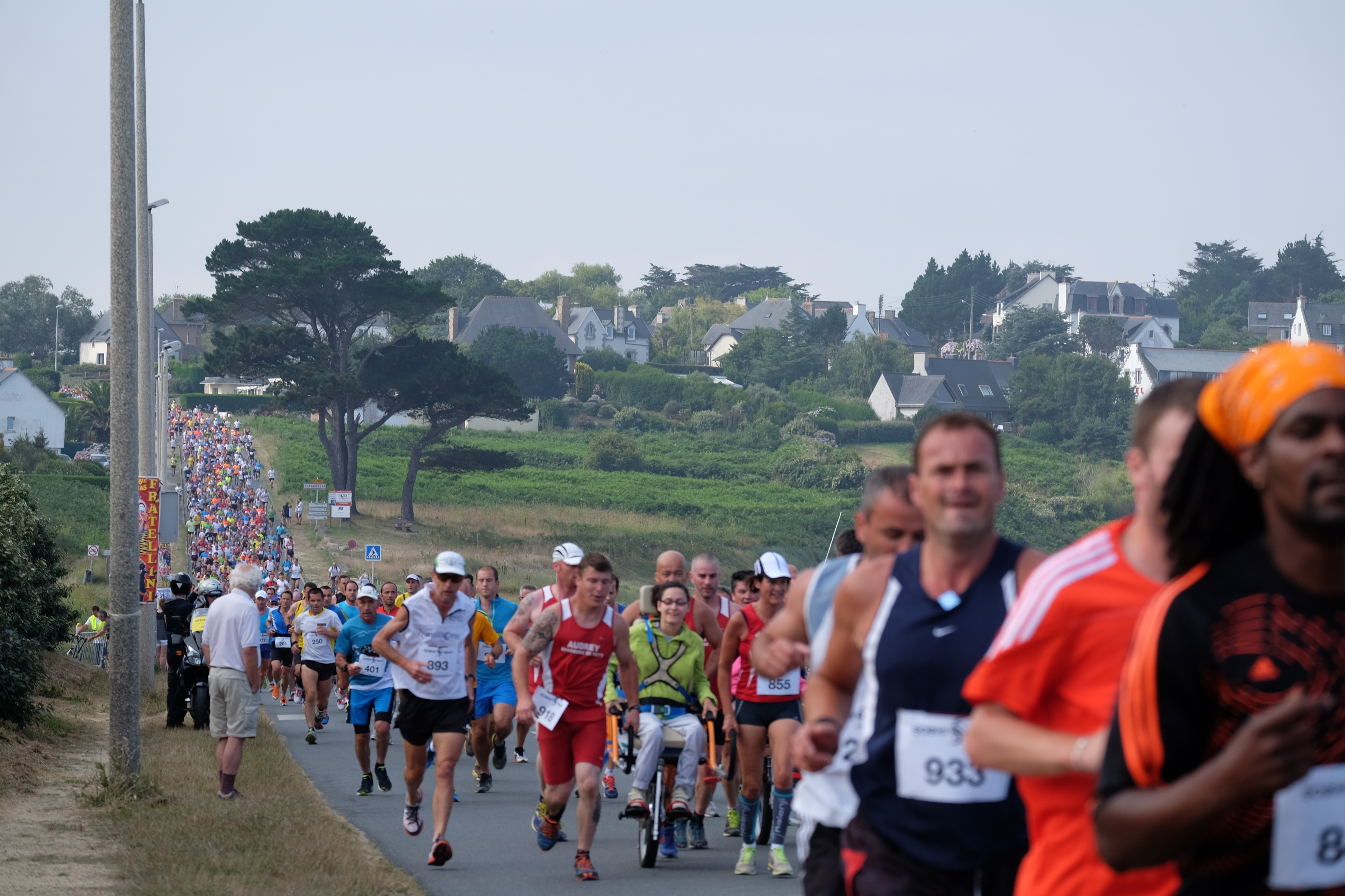 20 km de la Côte de granit rose 2014 - corniche de Goas Trez à Trébeurden